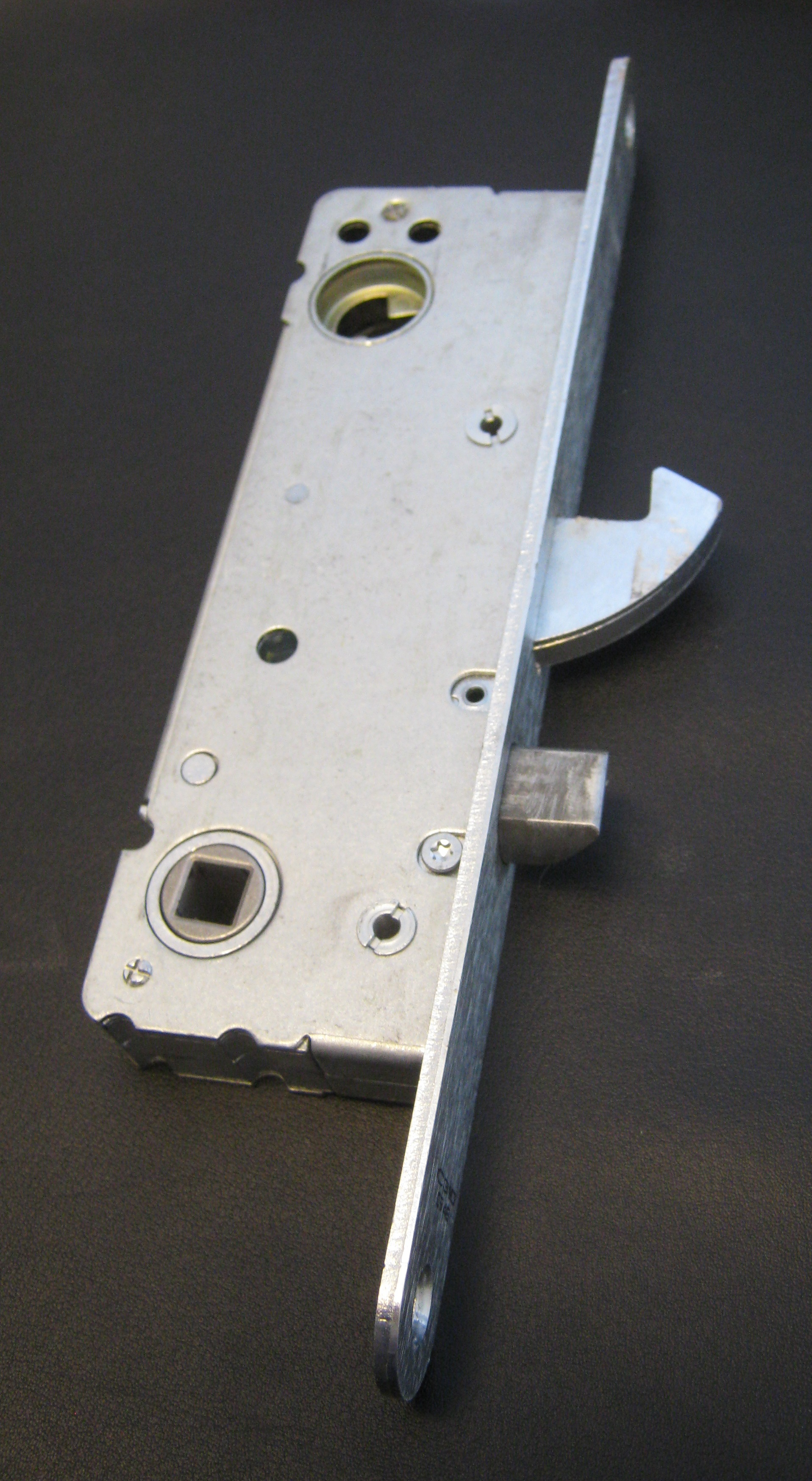 Låskasse Assa C310